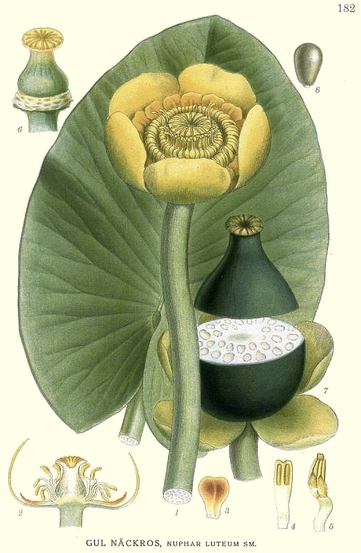 Nuphar lutea (L.) Sibth. & Sm. Original Description Gul näckros, Nuphar lutea Sm.